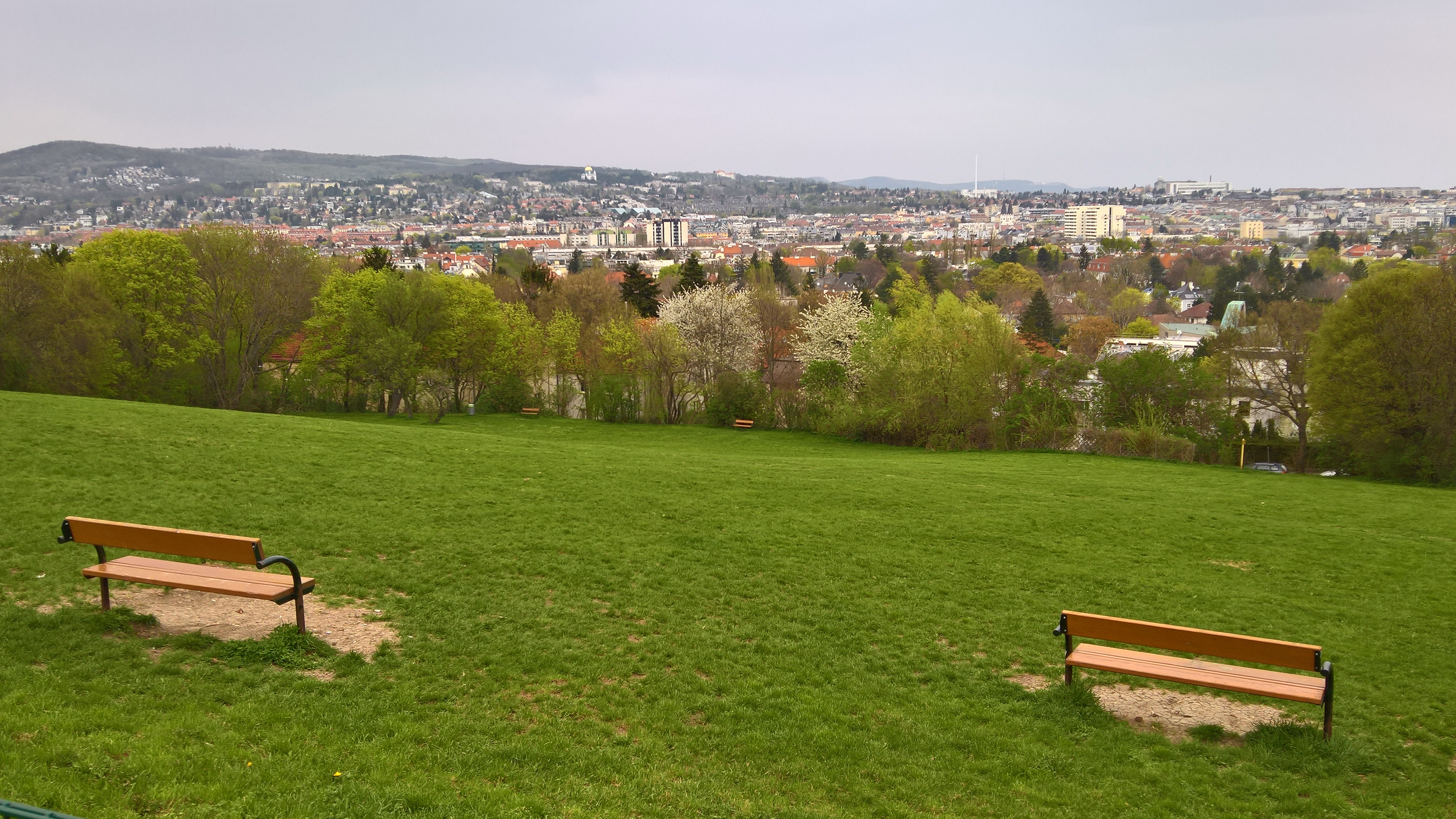 Blick vom Nordhang des Roten Berges in Richtung des 14. Wiener Gemeindebezirkes Penzing